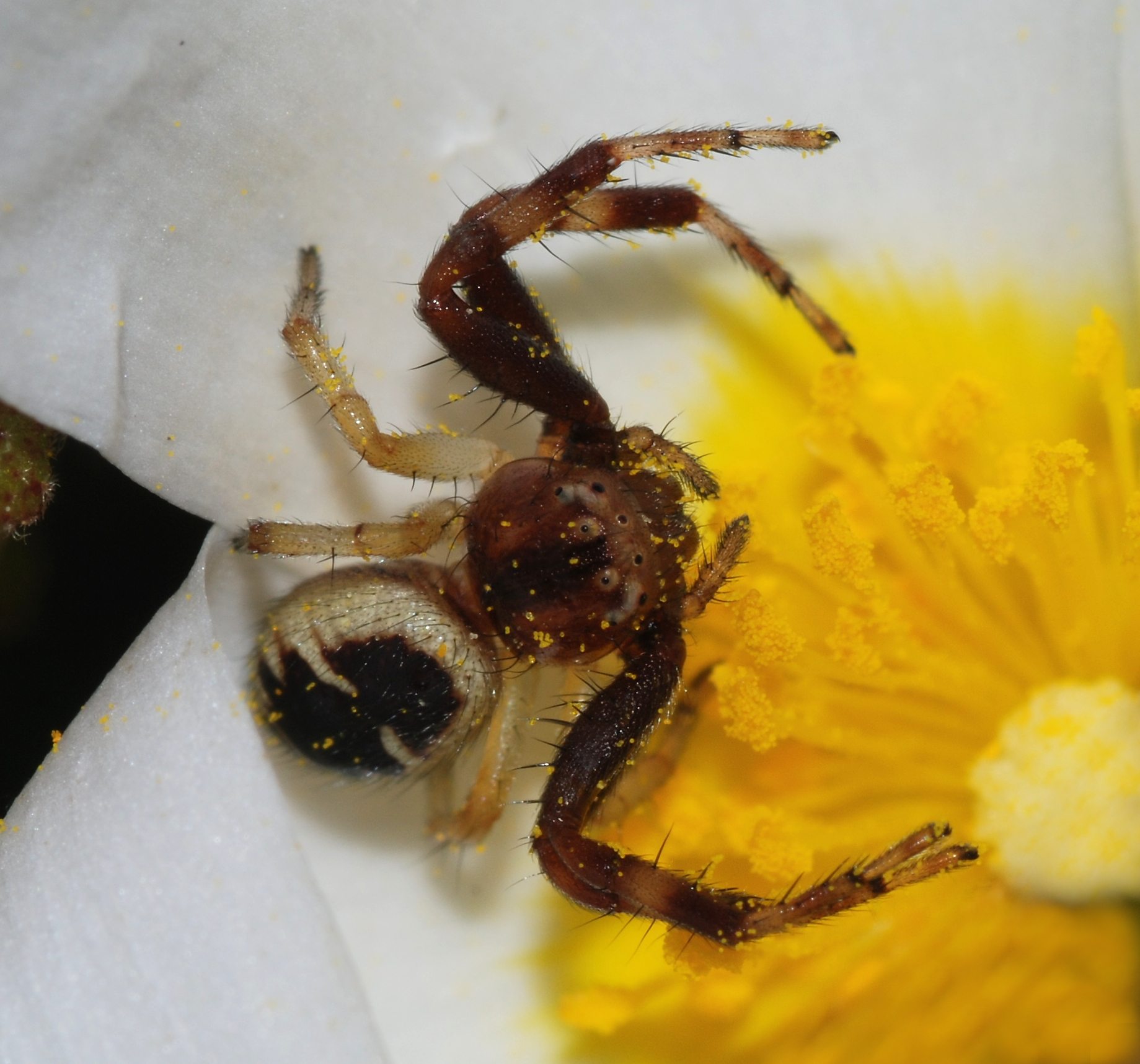 Synema globosum